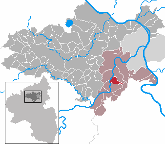 Oberfell in Rhineland-Palatinate - district Mayen-Koblenz